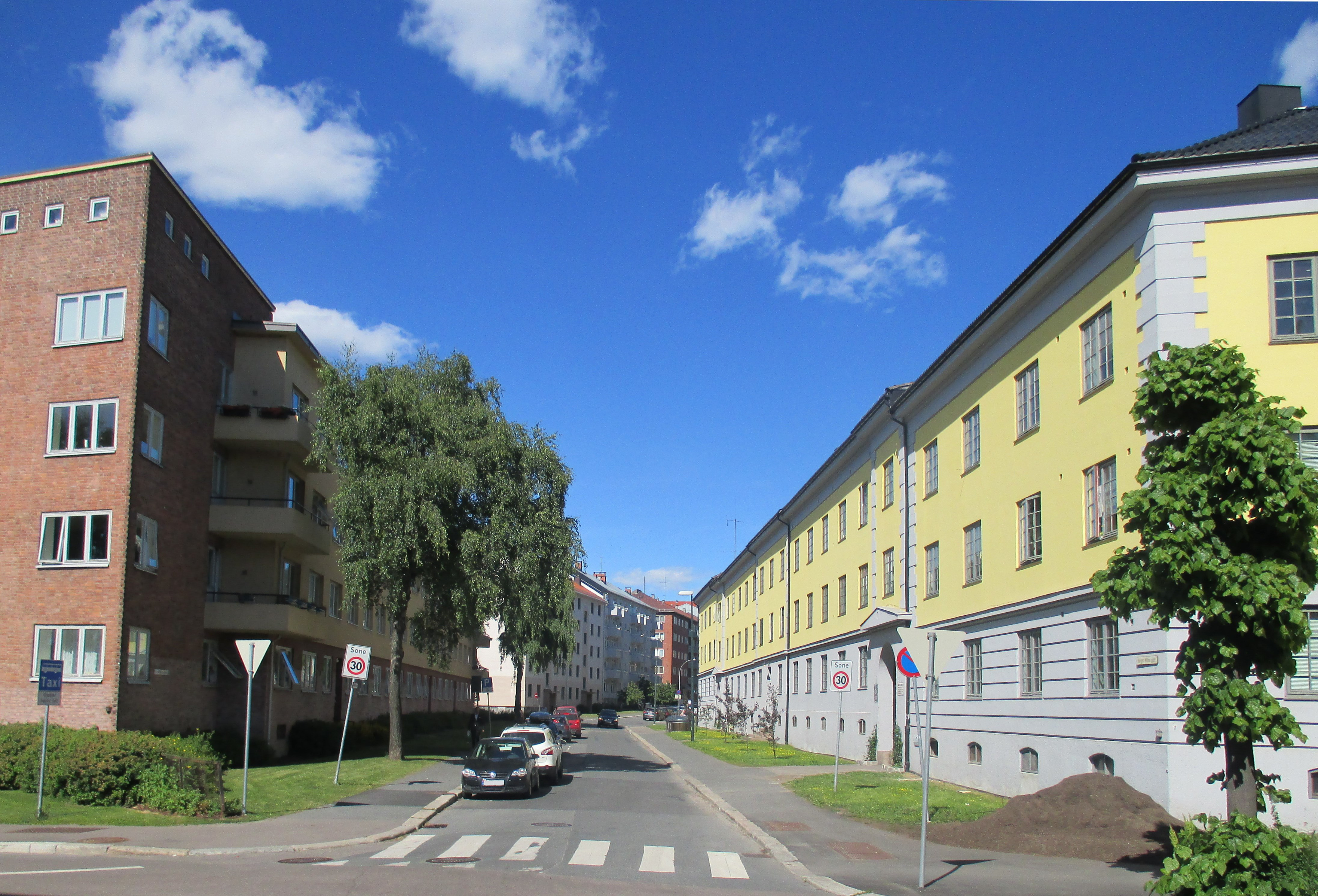 Borger Withs gate på Sandaker i Oslo